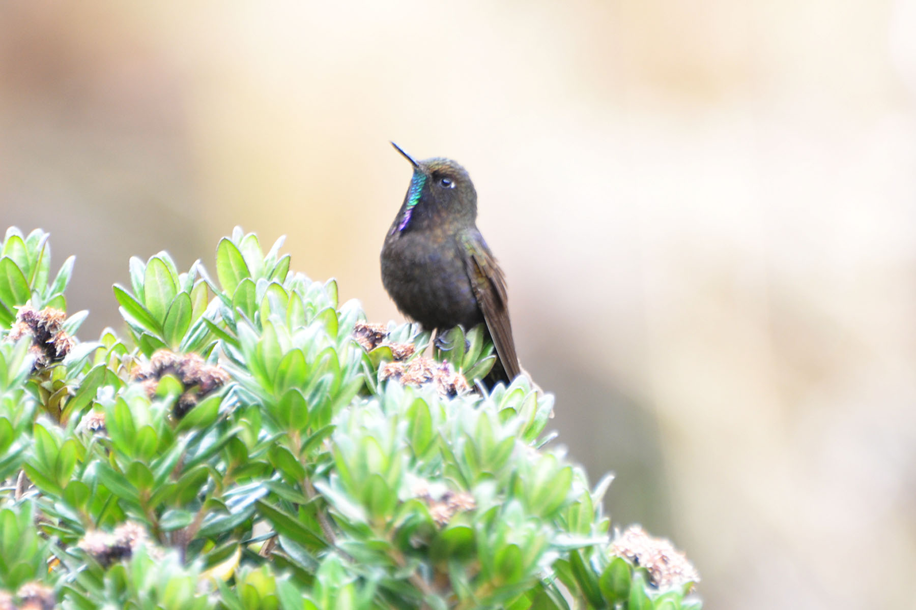 Chalcostigma stanleyi stanleyi 17-Sep-10 Papallacta Pass, Ecuador